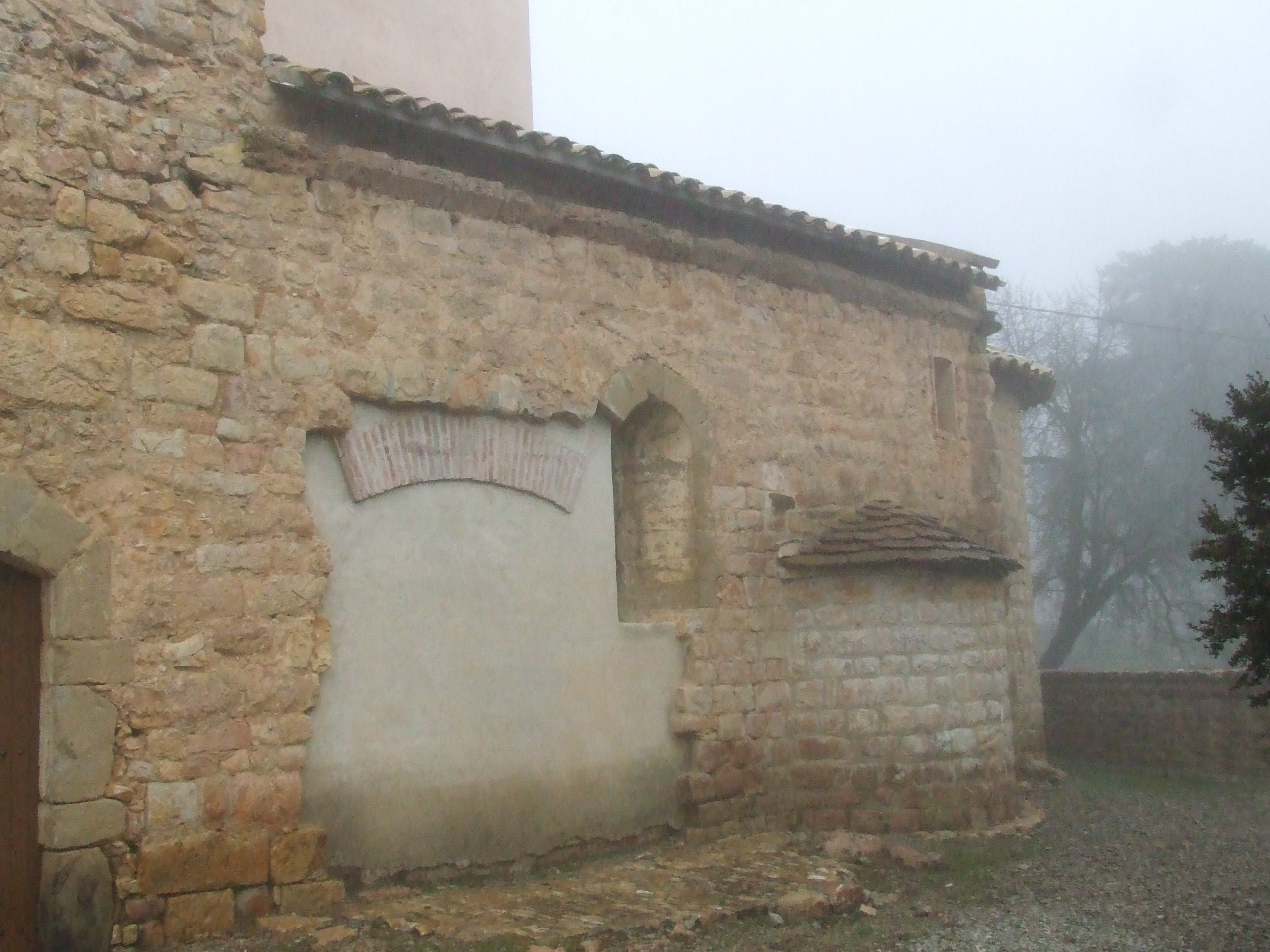 El santuari de la Mare de Déu de Bonrepòs (Sant Salvador de Toló, Gavet de la Conca, Pallars Jussà)